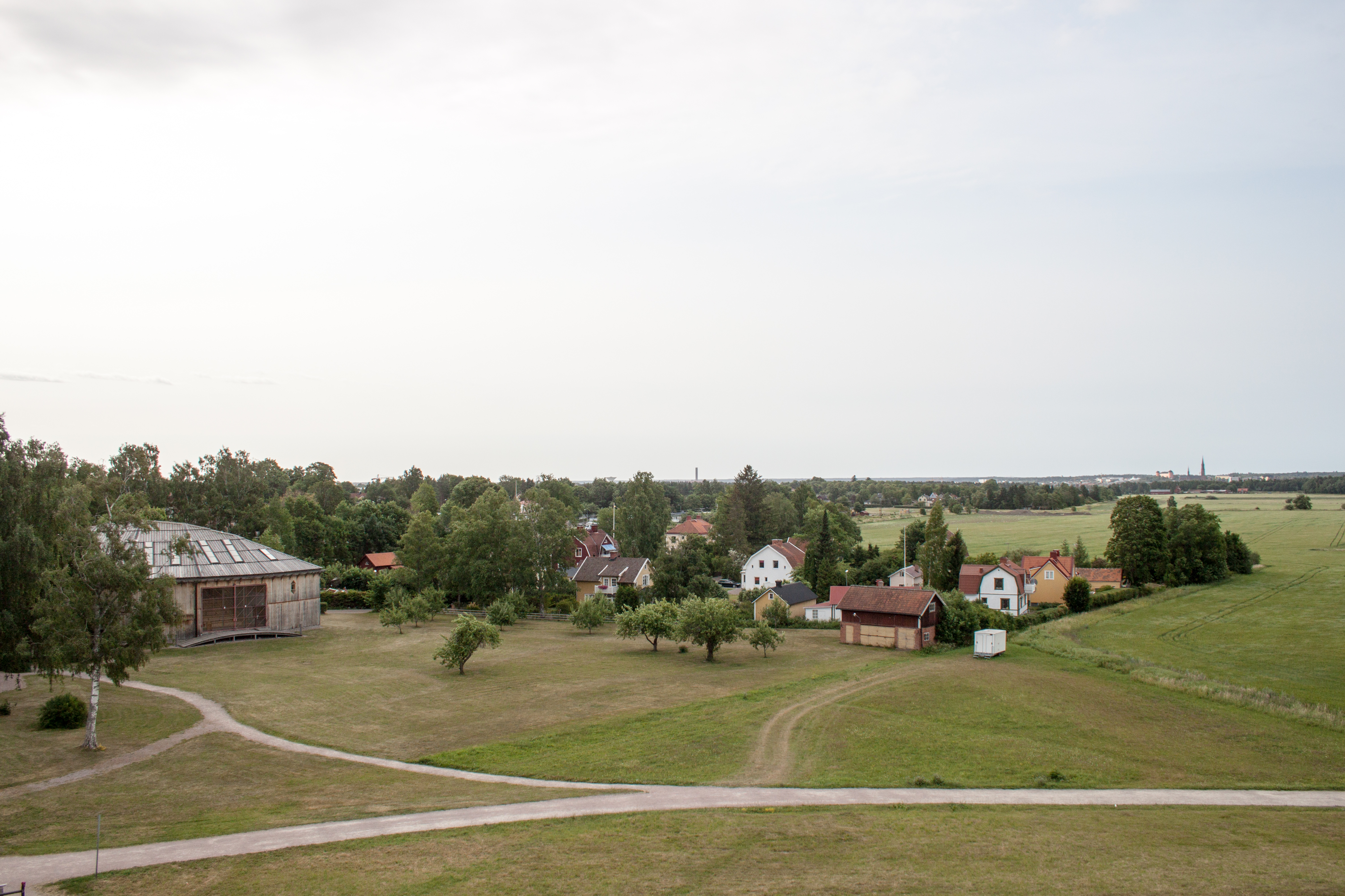 Royal mounds in Gamla Uppsala